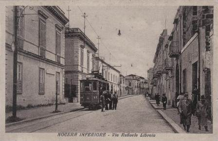 Nocera Inferiore - Via Librola